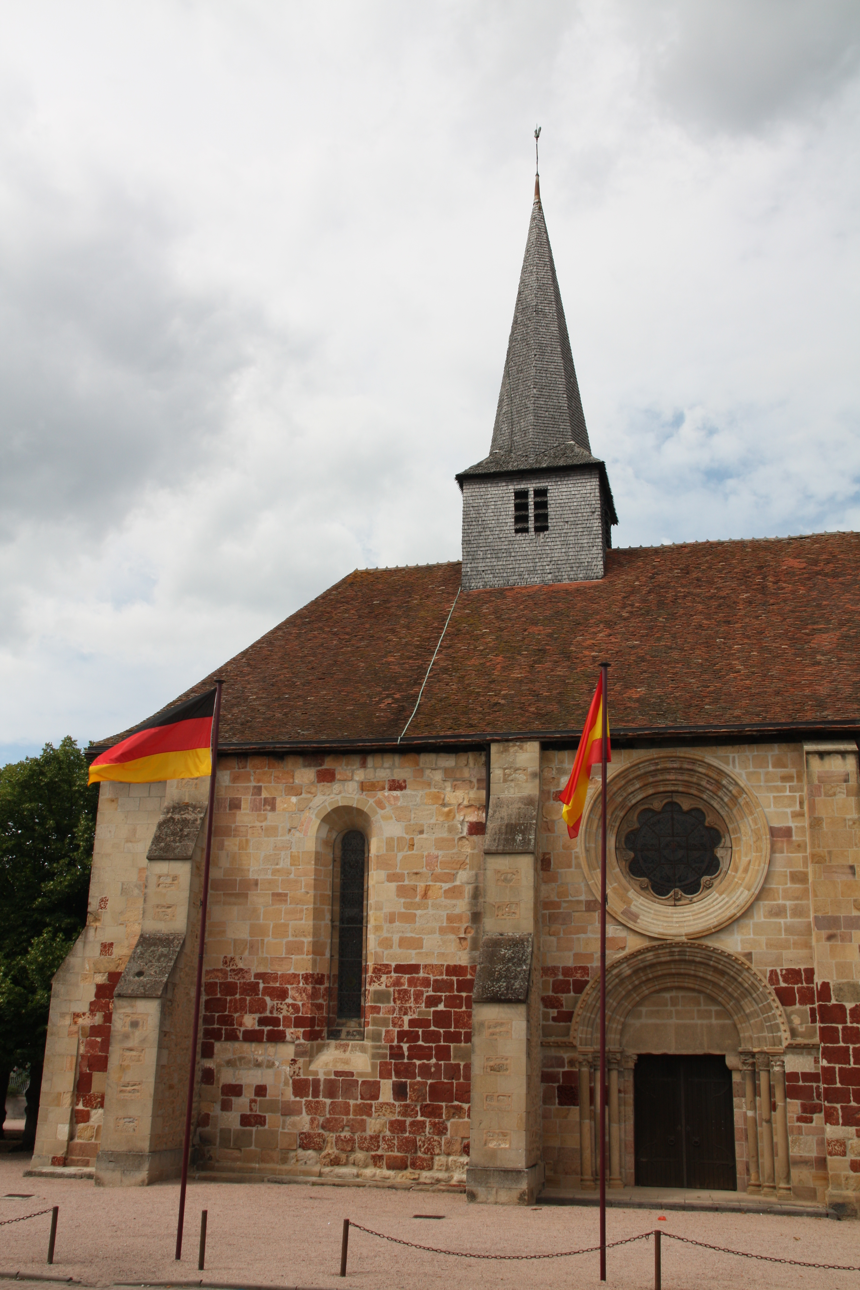 Église Saint-Jacques-le-Majeur à Villefranche d'Allier